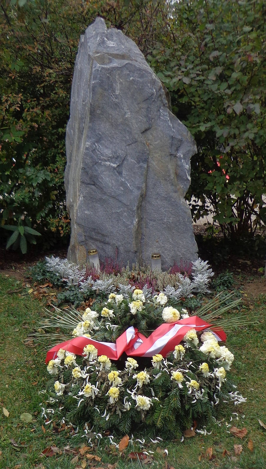 Wiener Zentralfriedhof - Gruppe 32 C, Ehrengrab von Alfred Maleta